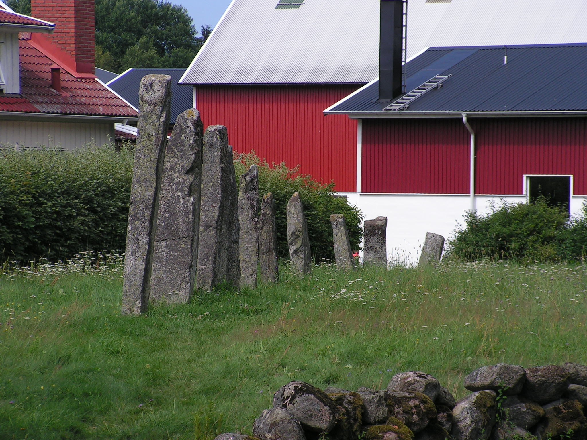 Stenehed, Munkedals kommun, Sverige